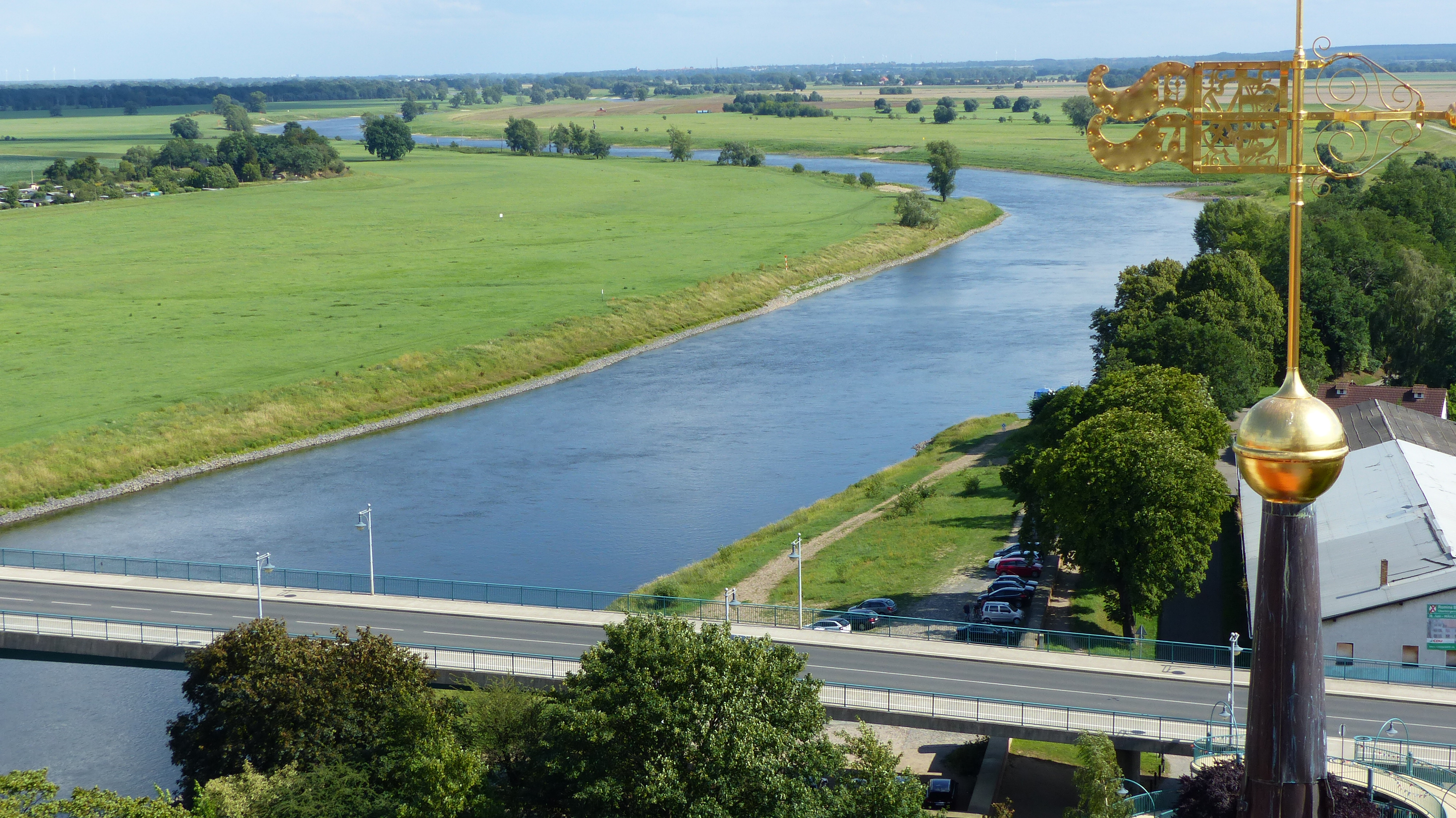 Blick auf die Elbe bei Torgau vom Schlossturm Hartenfels, Torgau, Sachsen